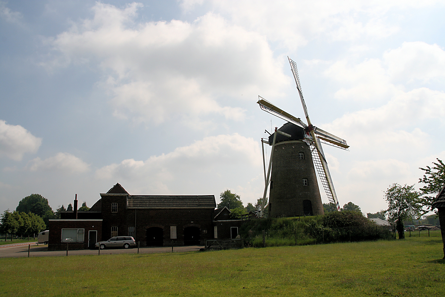 Breedenbroek: Kempermolen